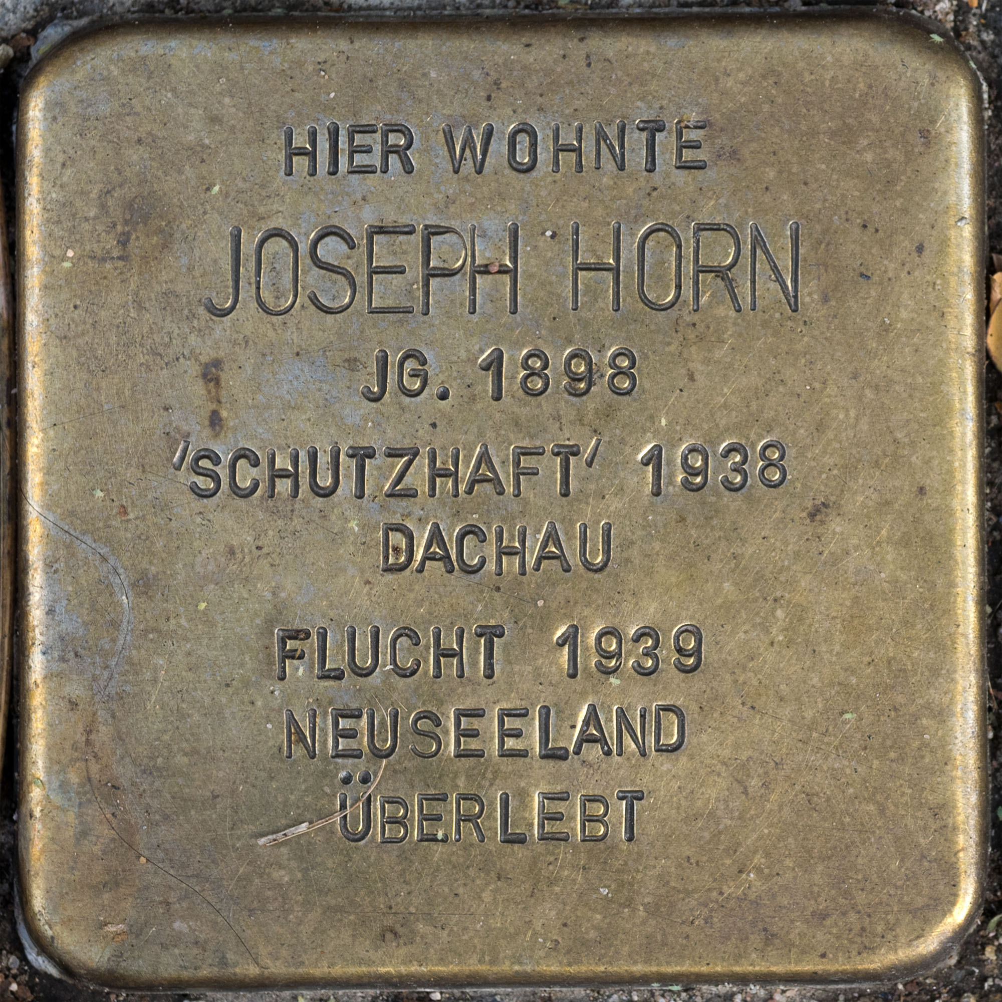 2016 Stolpersteine ToeVo Horn Joseph